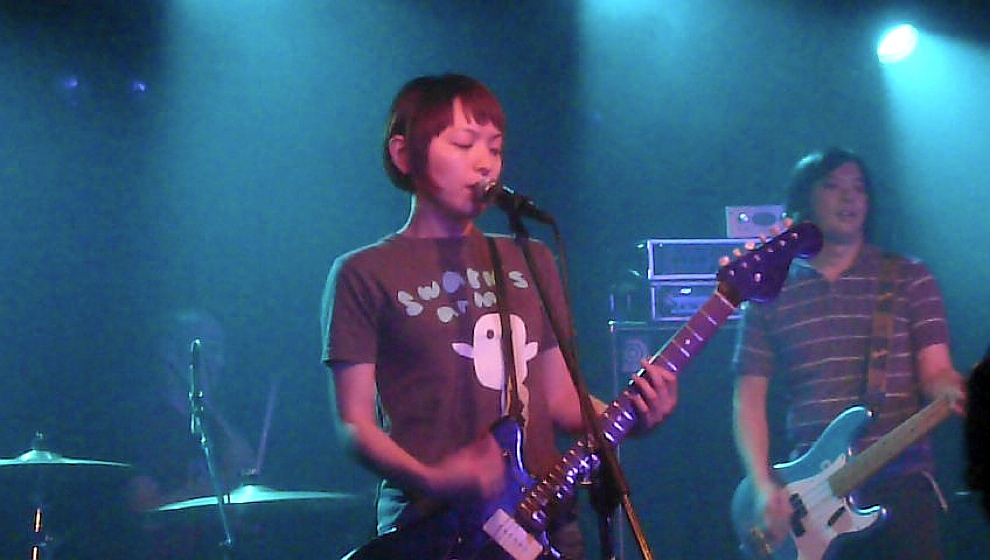 toddle(トドル)のライブ、2008年 (toddle concert, 2008)